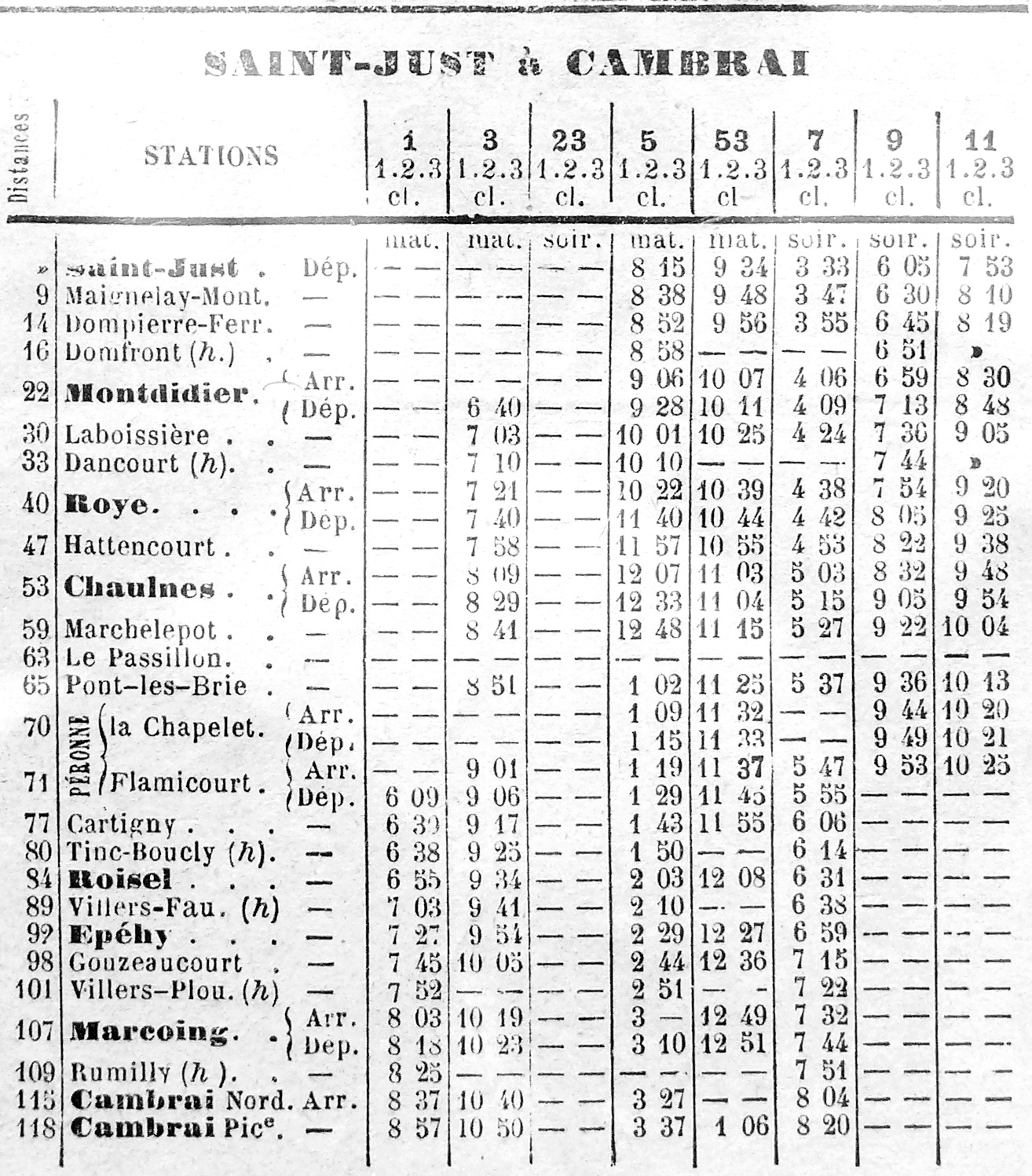 Extrait de l'affiche éditée en supplément du Le Courrier de la Somme : Horaires des trains du service d'hiver (novembre 1890) : Ligne Saint-Just à Cambrai